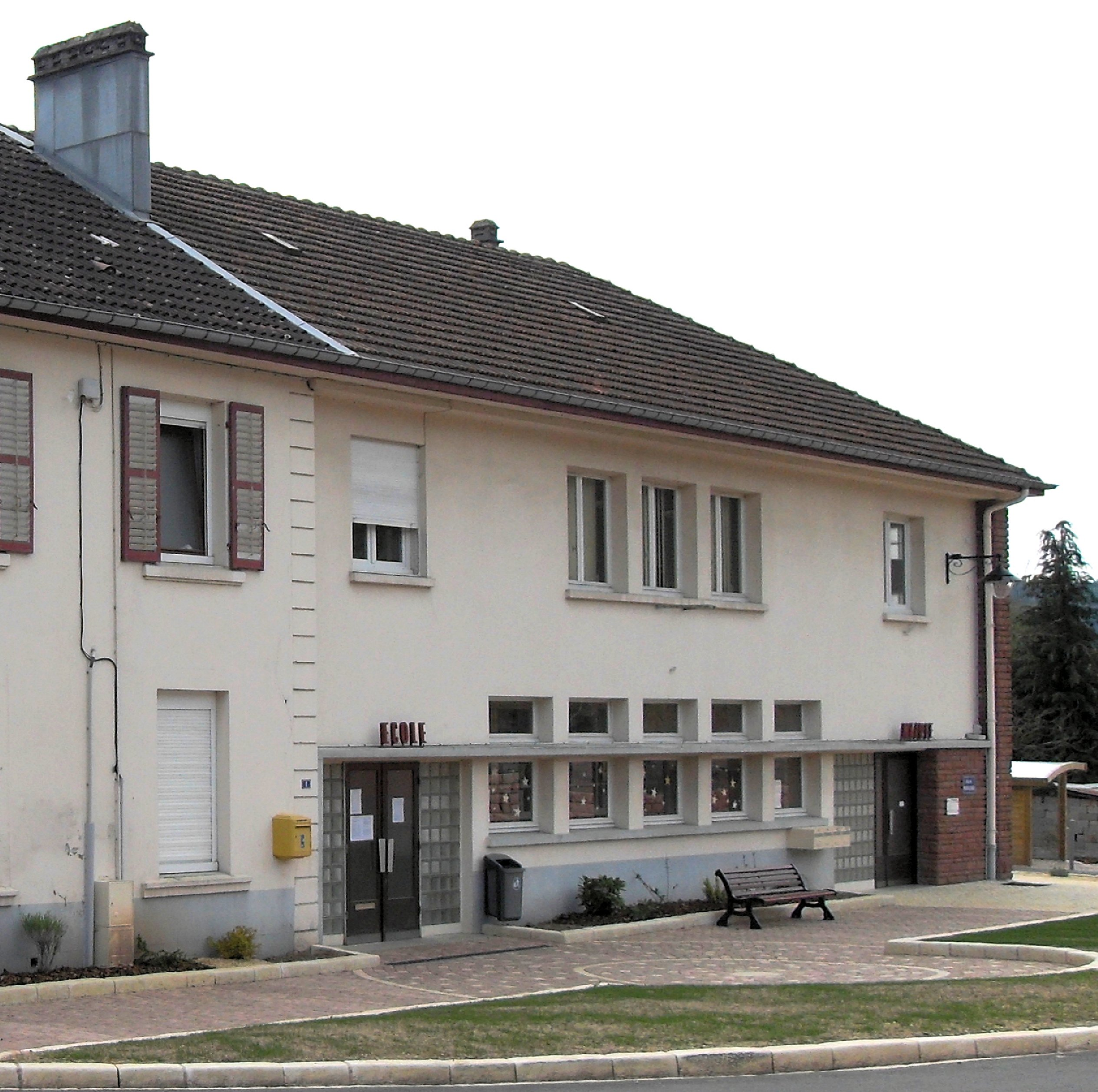 La mairie et l'école à Domfaing